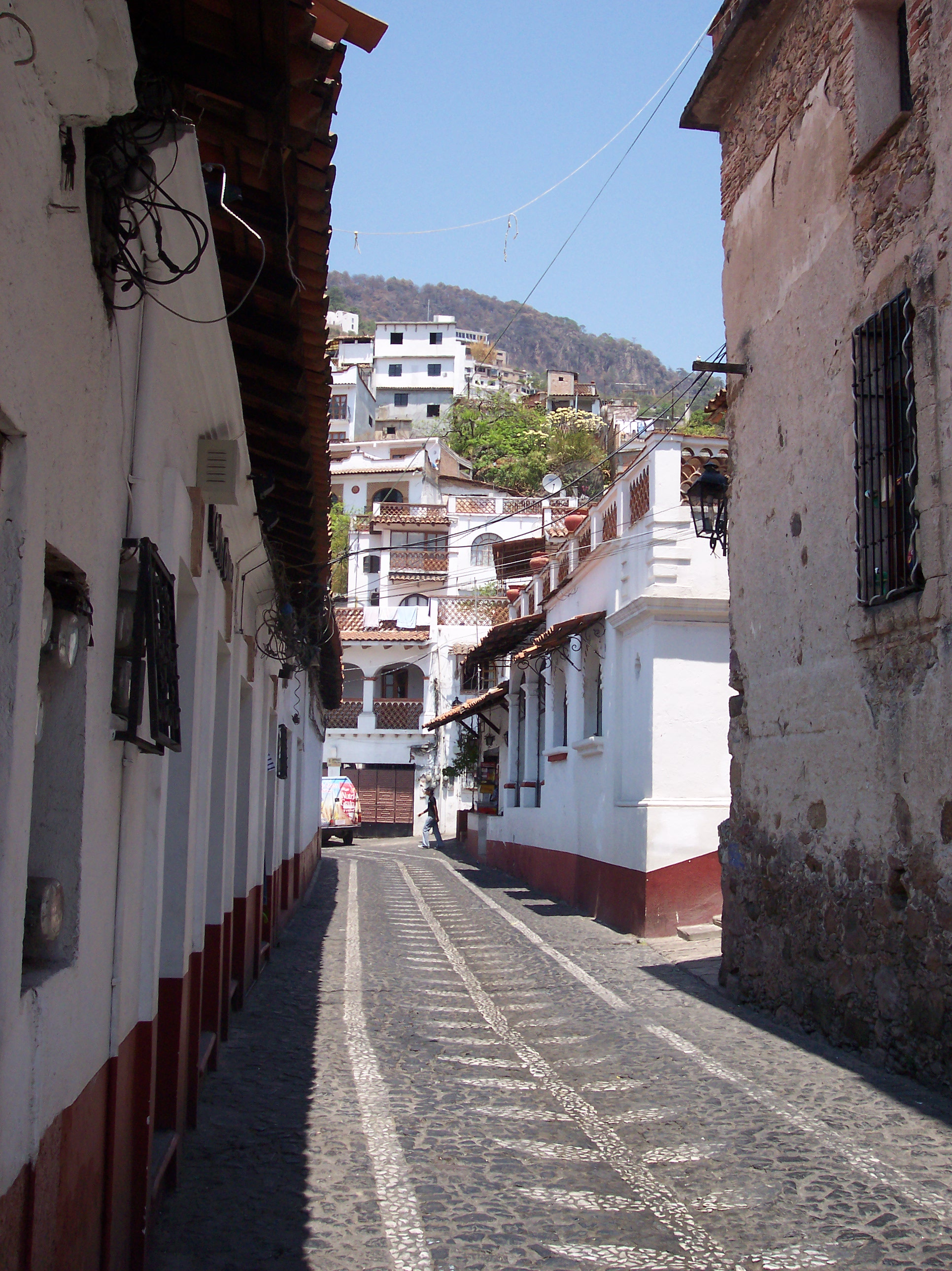 Tipical street in Taxco. Photo taken in Taxco de Alarcón Municipality, State of Guerrero, Mexico. SPANISH: Foto tomada en el municipio de Taxco de Alarcón, Estado de Guerrero, Mexico.